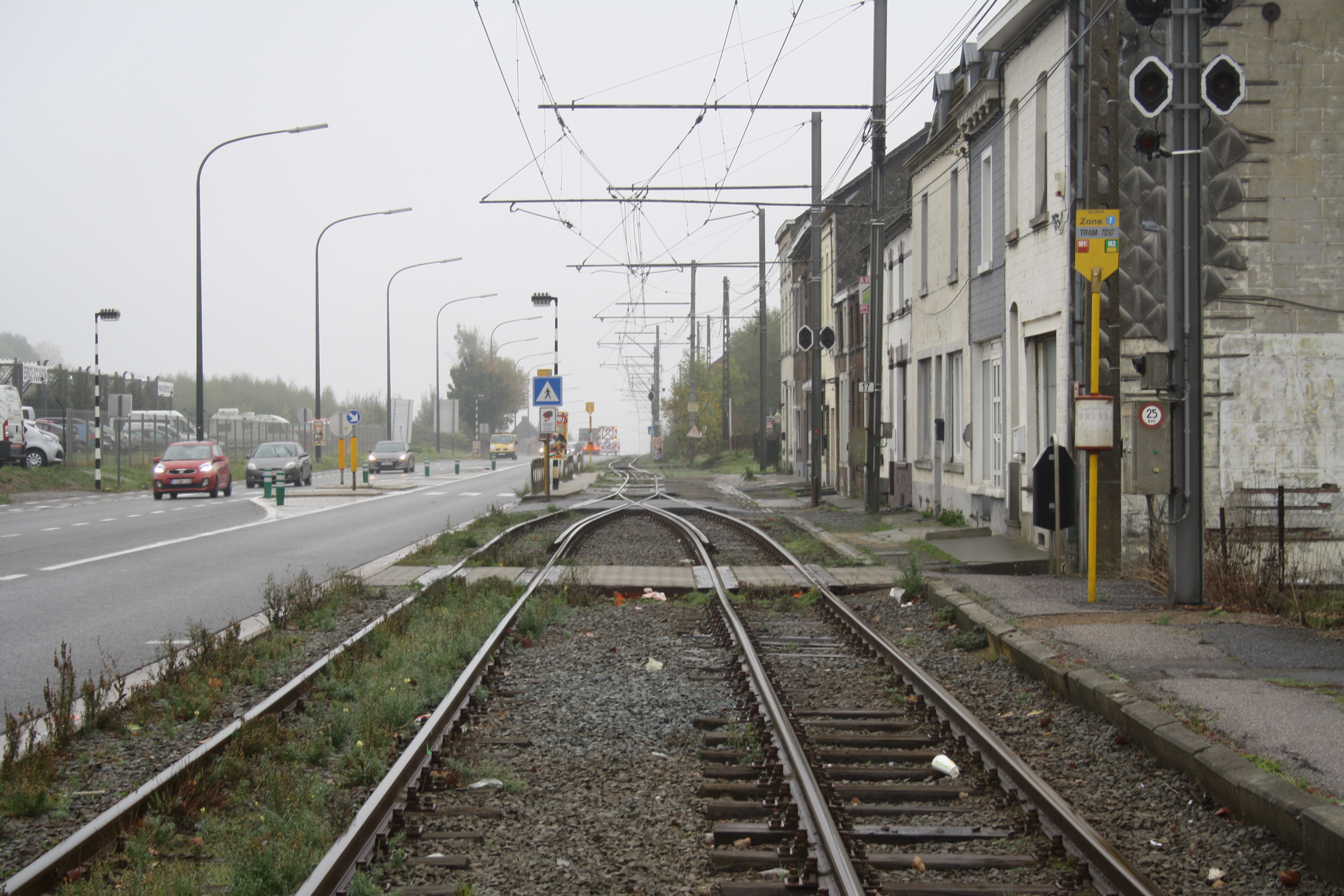 Haltestelle Surchiste der Métro léger Charleroi